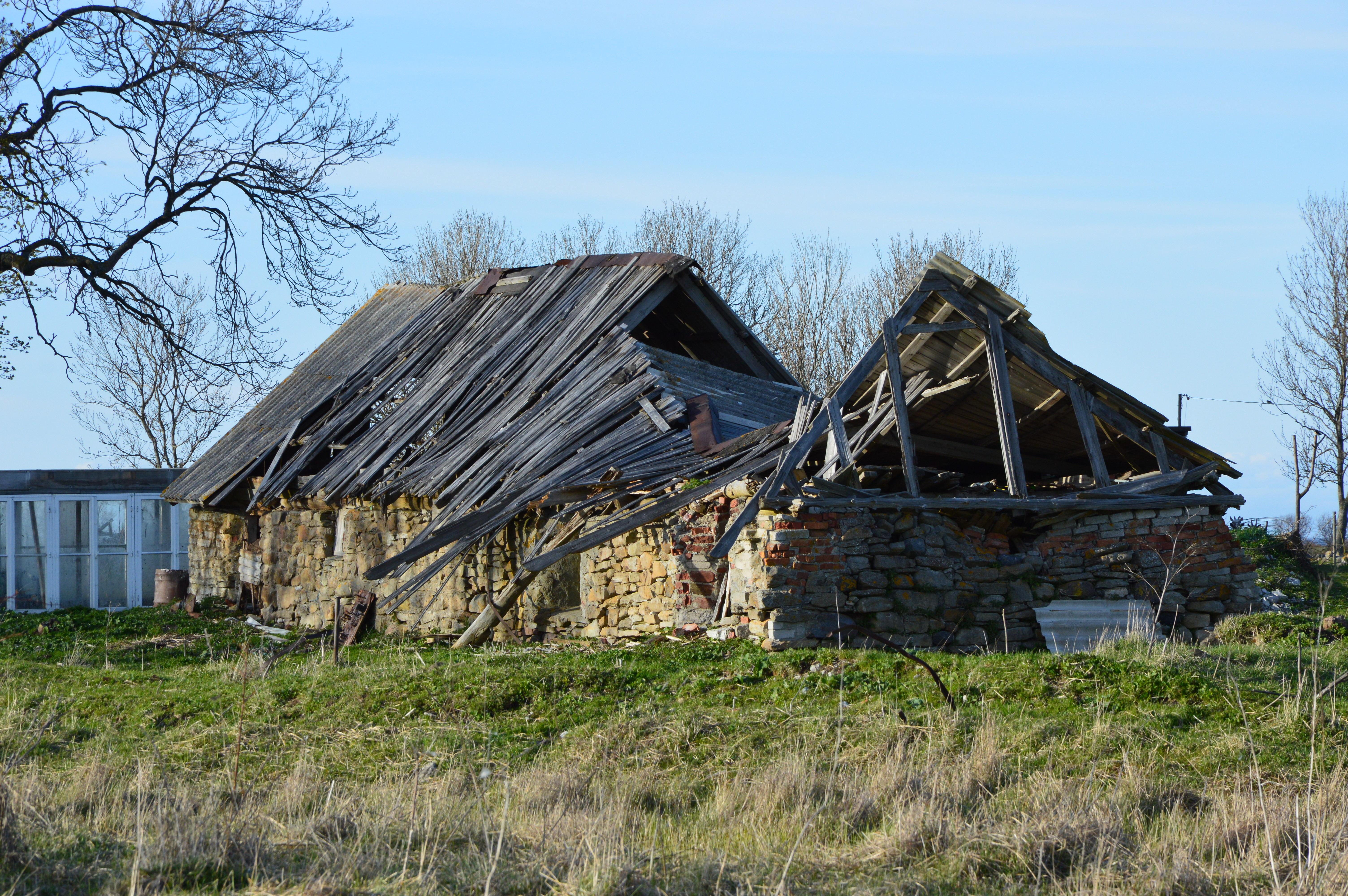 Erkase talu laut, Bien, Osmussaar.